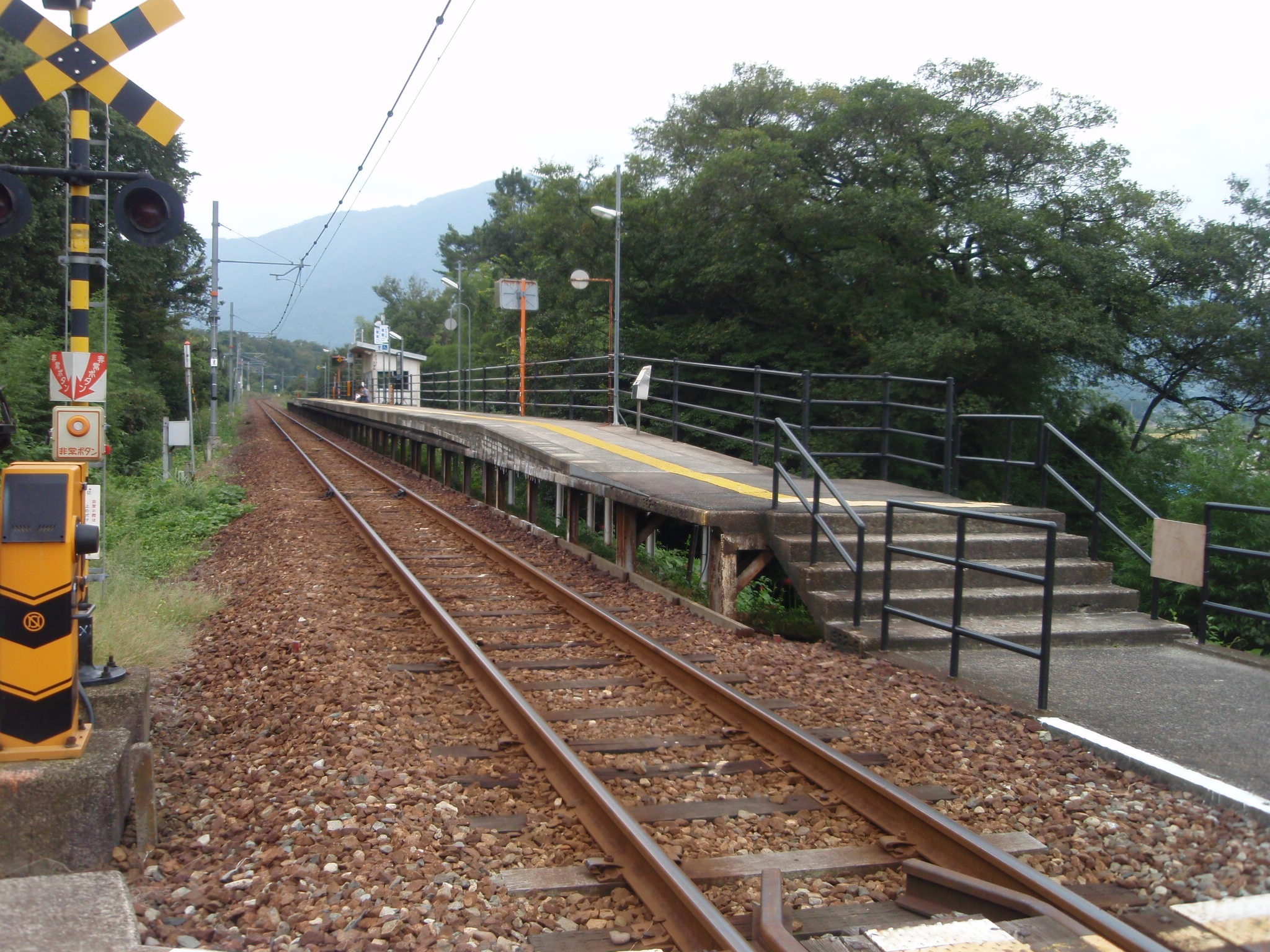 西敦賀駅 外観